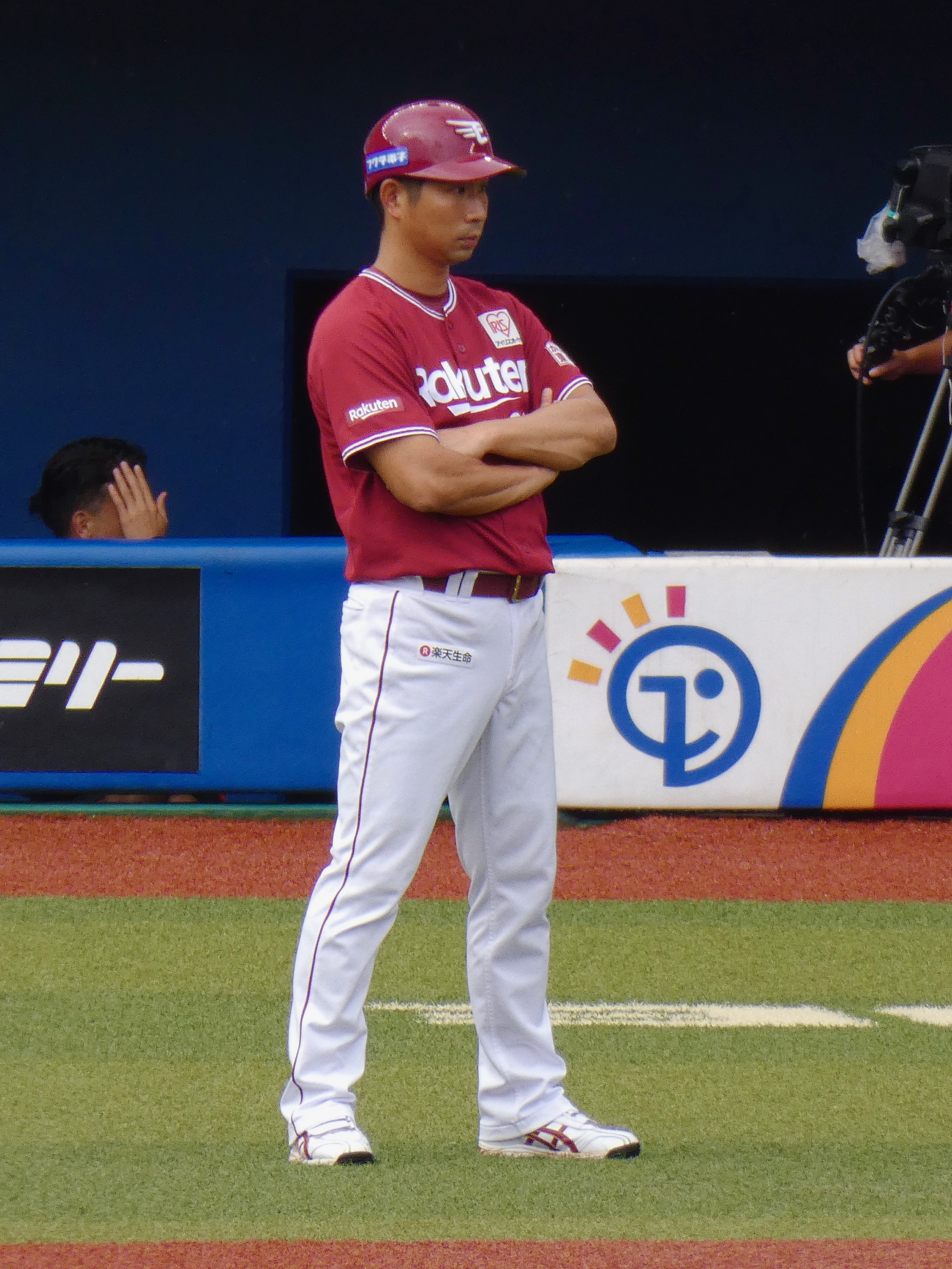 東北楽天ゴールデンイーグルスのコーチ。ZOZOマリンスタジアムにて。